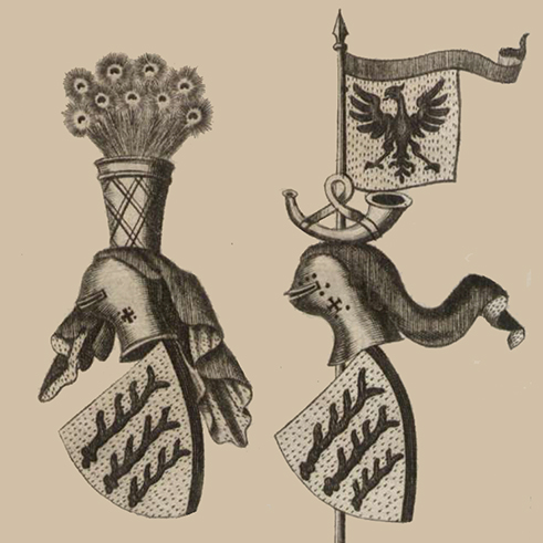 Wappen der Grafen Hartmann von Grüningen und Ulrich III. Württemberg Freisteller aus File:Wechsel-Schrifften Vom ReichsBannier Tafel.jpg (file no. 227; description at file no. 219)